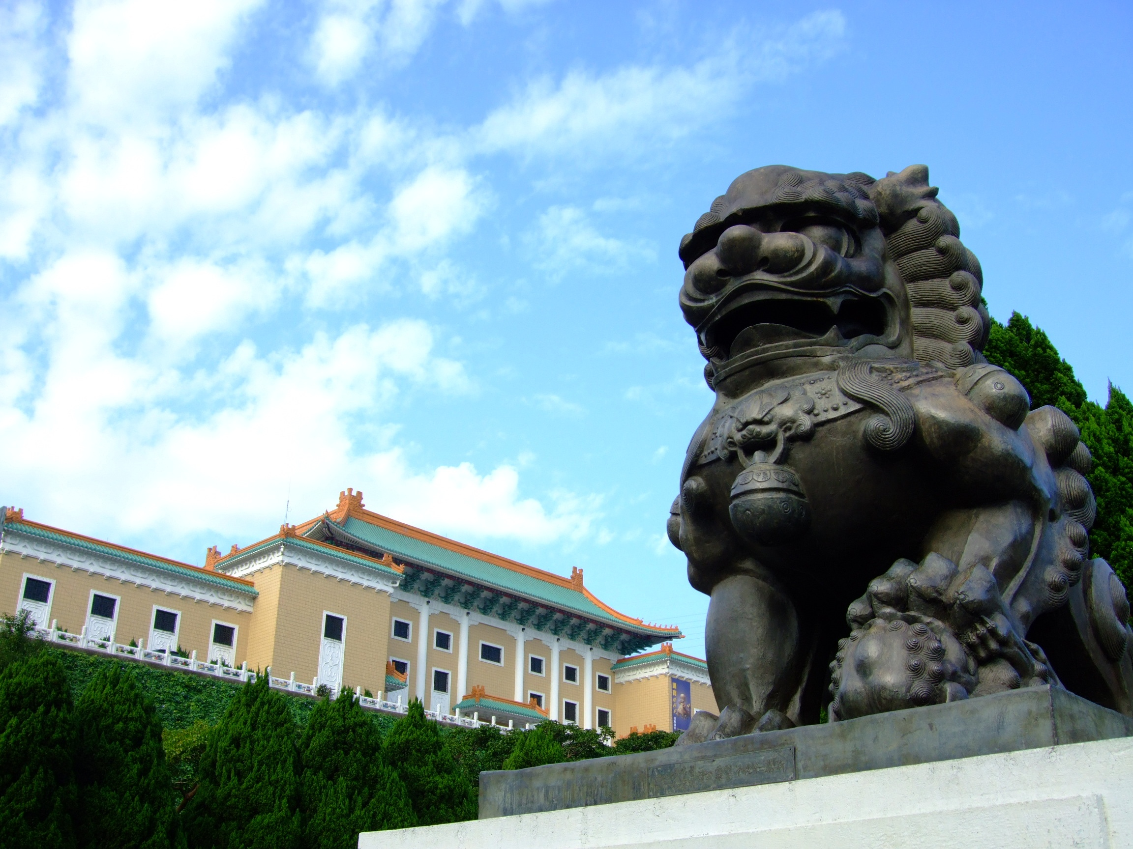 國立故宮博物院入口右側銅鑄的母獅子，孫超鑄造，左腳掌撫慰著小獅。